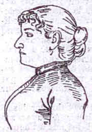 Portrait de Louise Sicard, Reine des Reines de Paris 1891, publié la veille du défilé de la Mi-Carême.